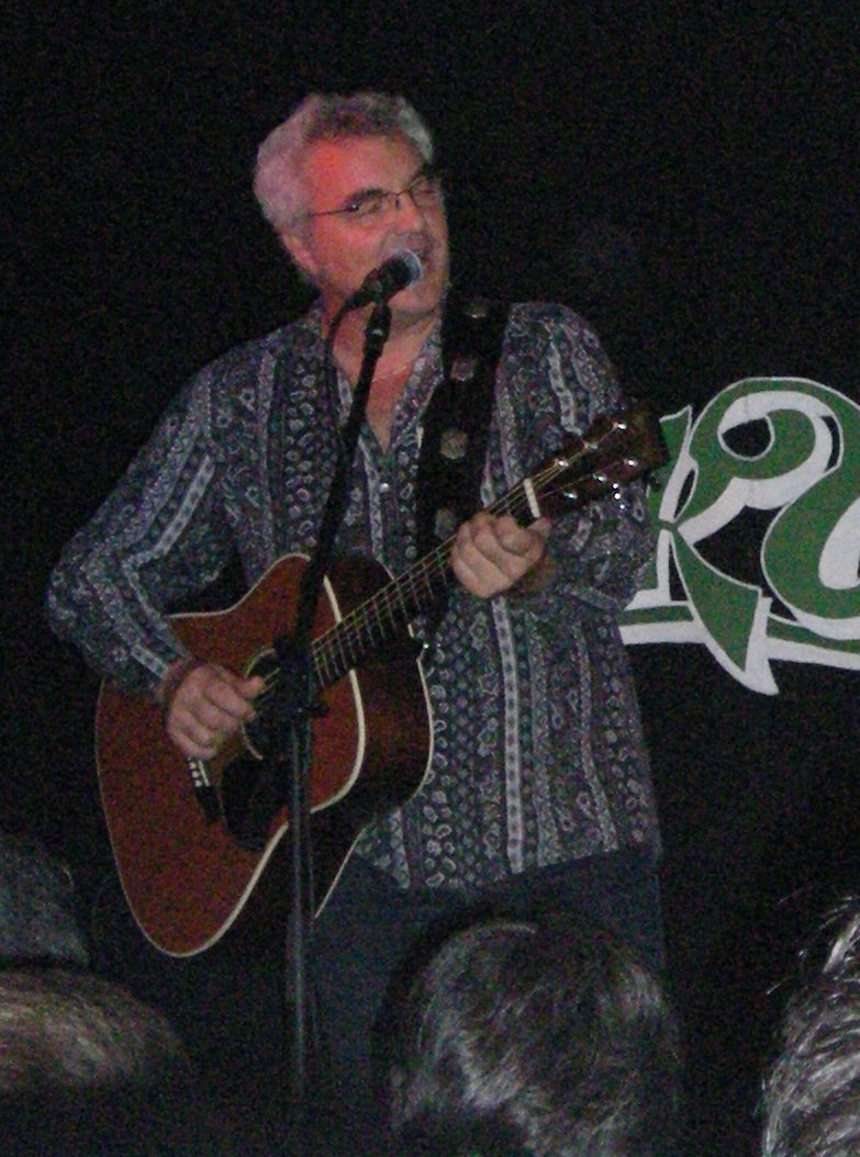 Massimo Bubola al Folkclub di Torino, sabato 11 ottobre 2008. Foto di Vito Vita